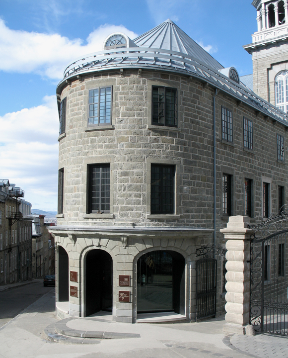 Musée de l'Amérique française, Québec, Canada